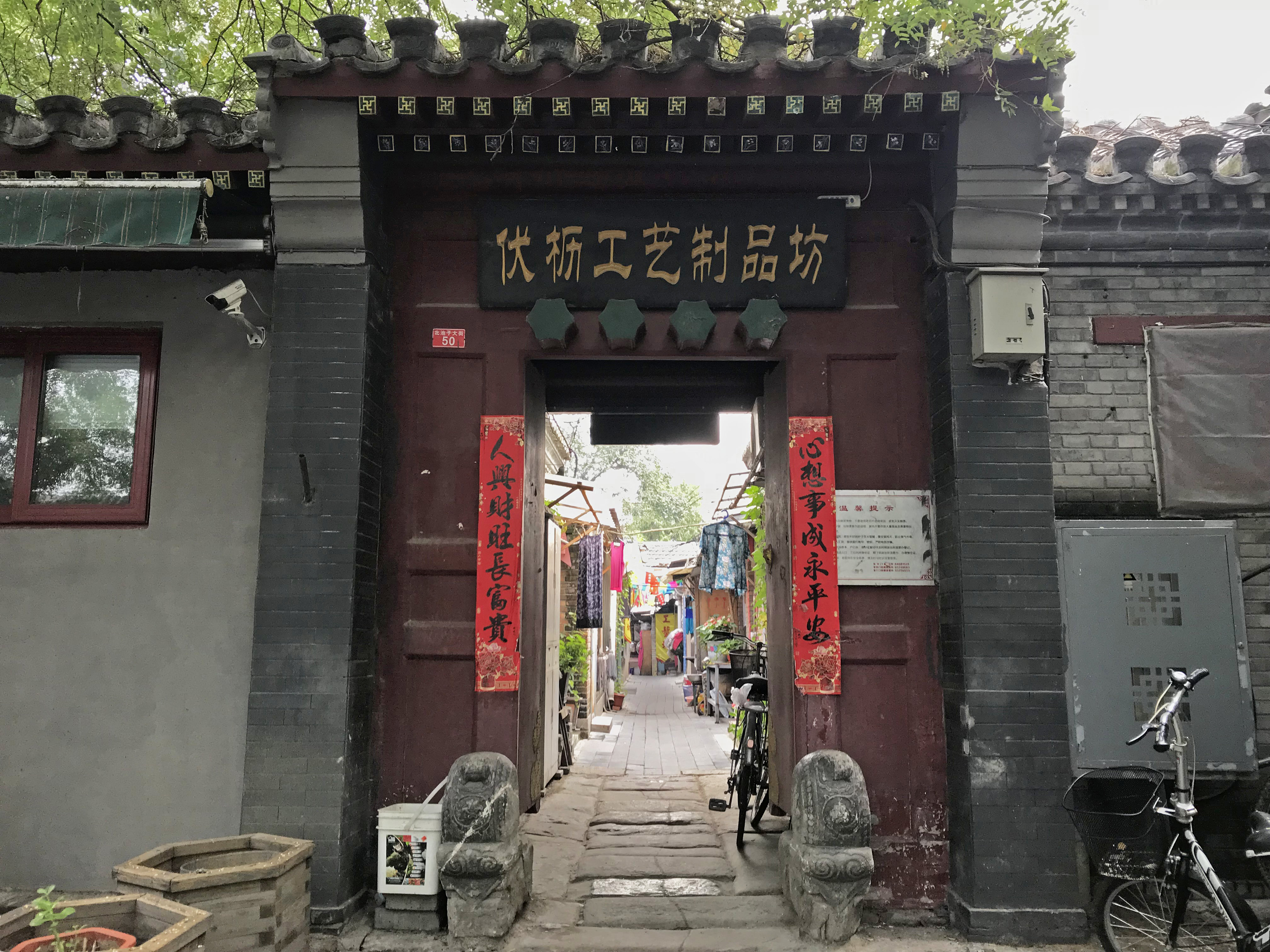 Typisches Hutong in Peking. Jede Gasse hat ihren eigenen Charme. You're welcome to use this picture free of charge, as long as you follow the license terms. As a matter of courtesy a link (dofollow links are welcome!) to is much appreciated. Thank you! ————————–—–—–—–—–—–—–—–—–—–—–—–—–—–—– Du kannst dieses Bild gemäß der Lizenzbestimmungen unentgeltlich nutzen. Über eine Verlinkung (dofollow am liebsten) auf freuen wir uns. Danke!